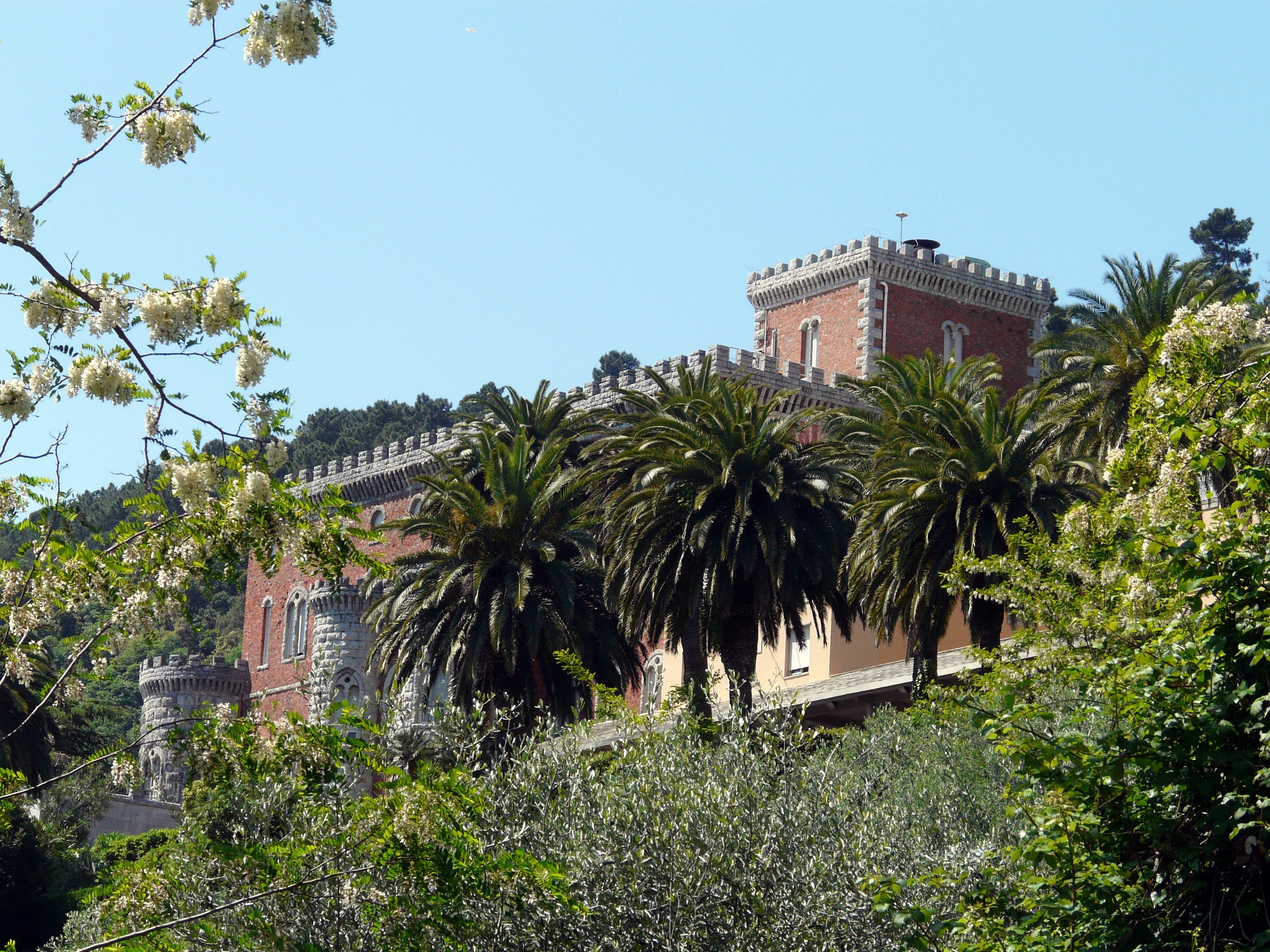 Monastero di Santa Croce del Corvo a Bocca di Magra, Ameglia, Liguria, Italia